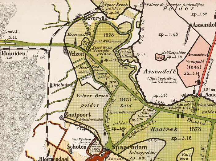 Wijkermeerpolder